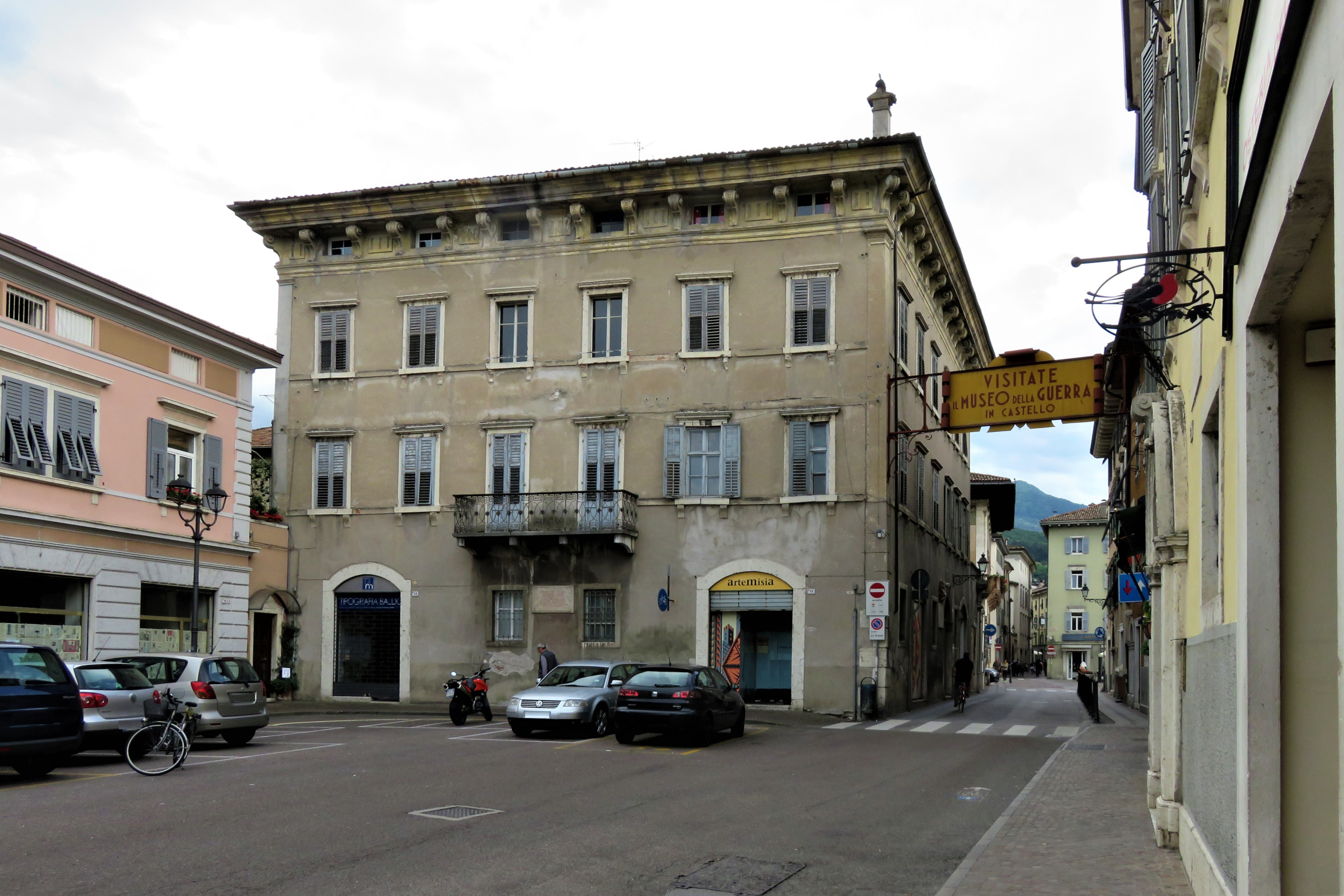 Casa Candelpergher, antico albergo della Rosa, prima delle ristrutturazioni del 2019.